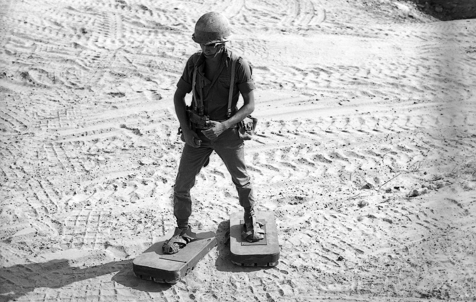 סנדלי חבלנים 2